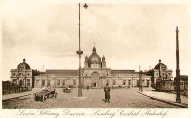 Львів. Головний Вокзал. 1916